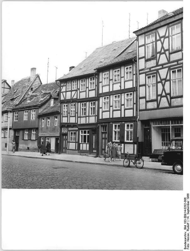 Quedlinburg, Pölkenstraße, Fachwerkhäuser Zentralbild Hesse-He-Hau-14.9.1966 Quedlinburg.Quedlinburg ist reich an schönen alten Fachwerkhäusern.Blick in die Pölkenstrasse.